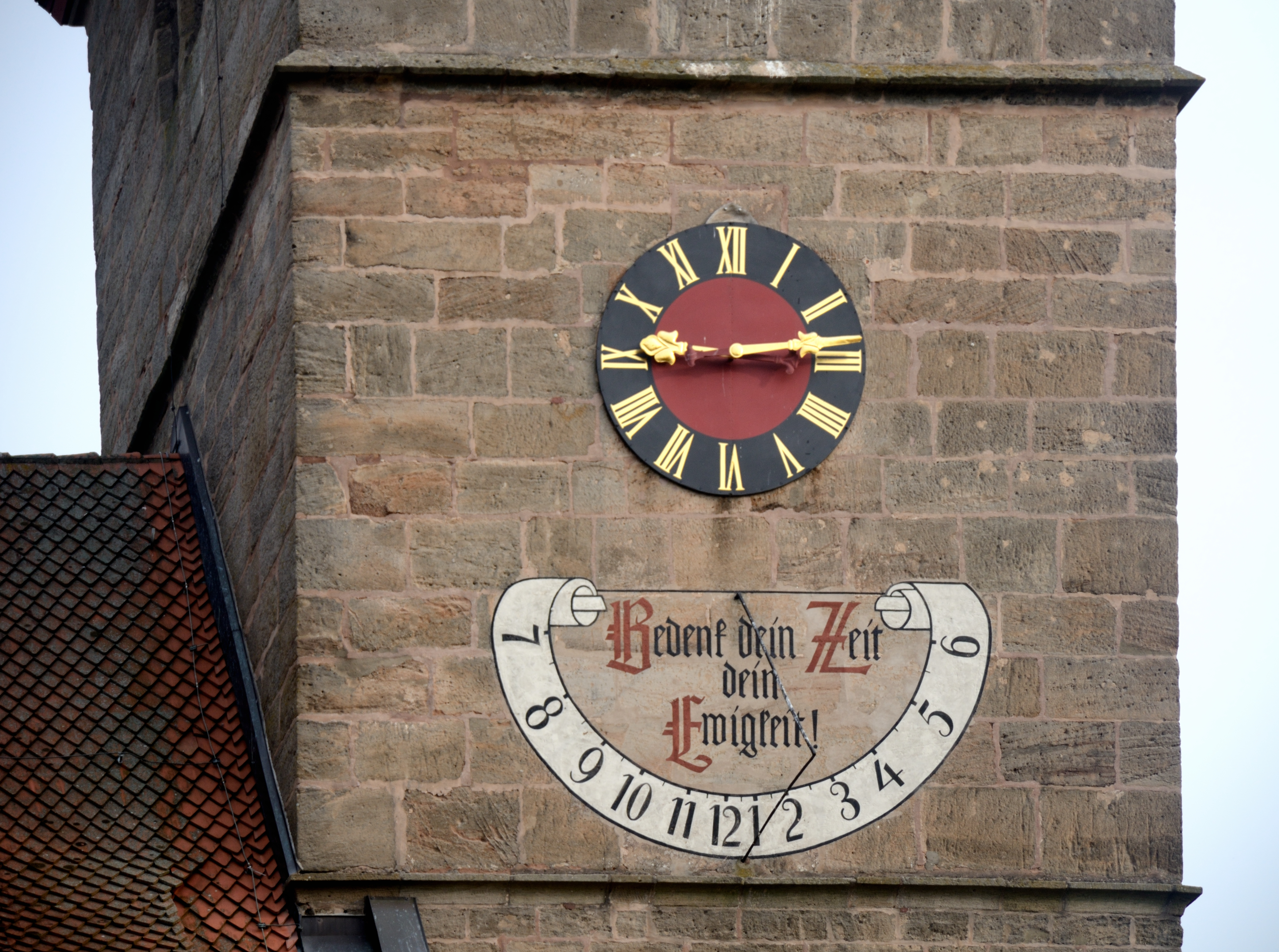 St. Veitskirche (Veitsbronn); Kreuzrippengewölbe des Chorraums